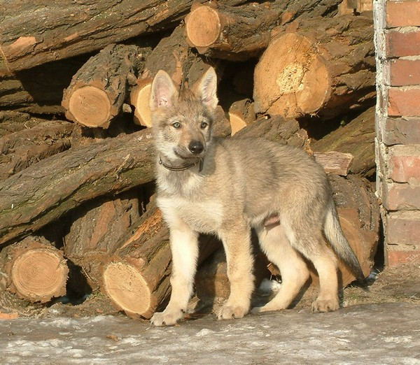 Tsjecho-Slowaakse wolfhond - Eligo z Peronowki